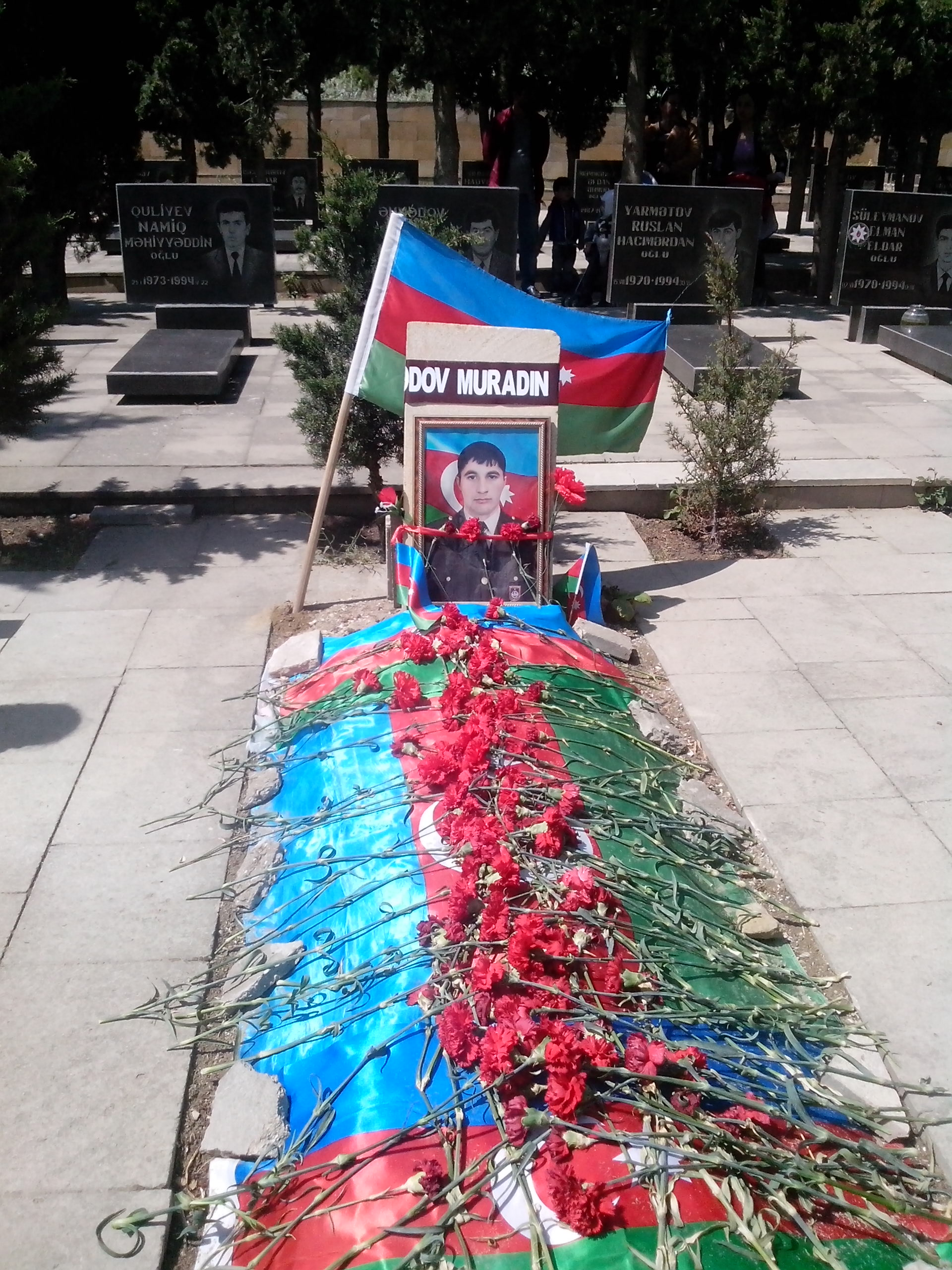 Sumqayıt Şəhidlər Xiyabanında dəfn olunan şəhid